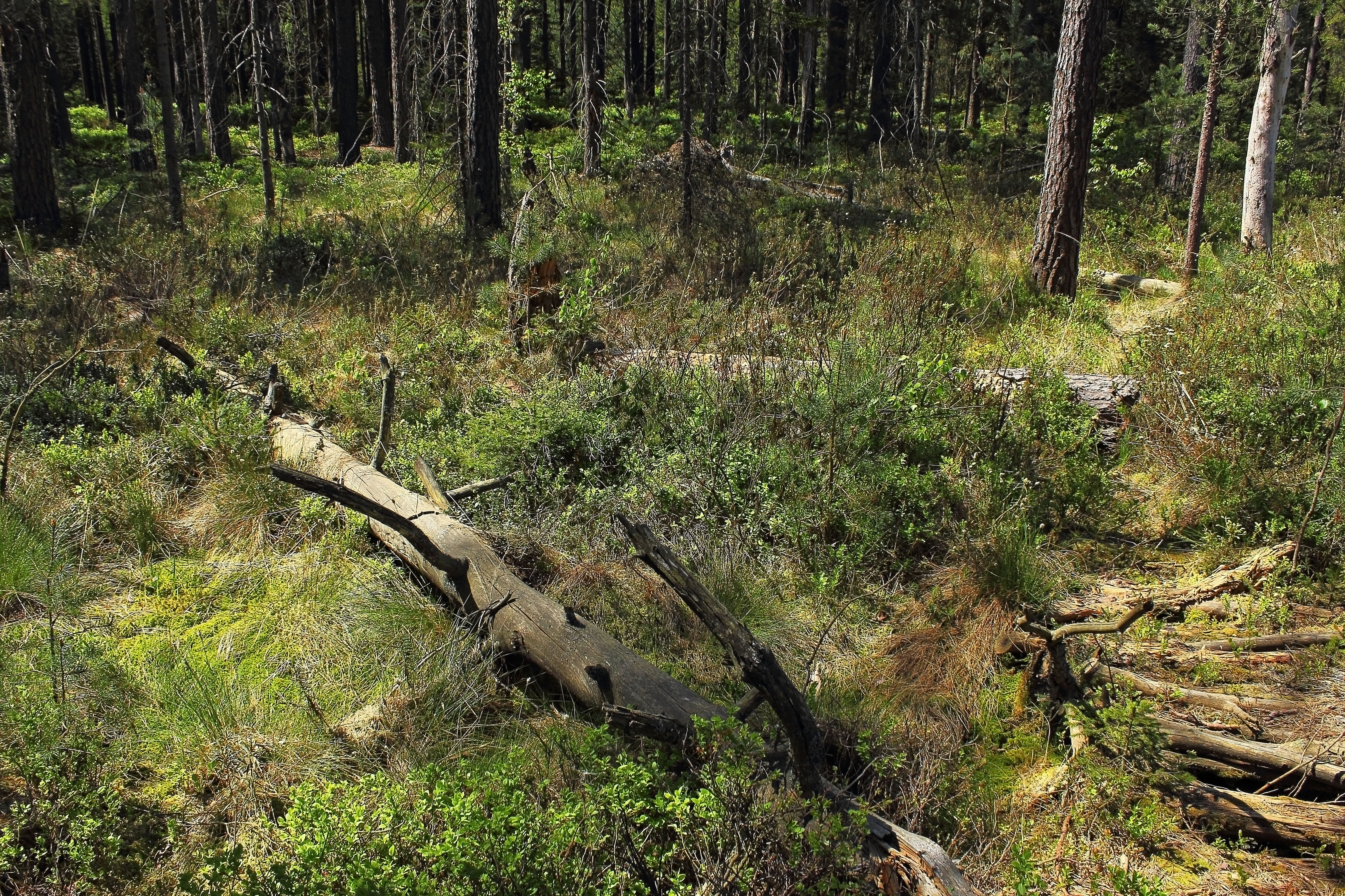 Das Rottalmoos liegt südwestlich von Litschau auf rund 542 Meter Seehöhe und erstreckt sich über eine Fläche von 10,86 Hektar. In dem seit 1999 zum Naturschutzgebiet erklärten Hochmoor wachsen viele gefährdete Pflanzen, etwa der Sumpfporst. This media shows the nature reserve in Lower Austria with the ID 46.